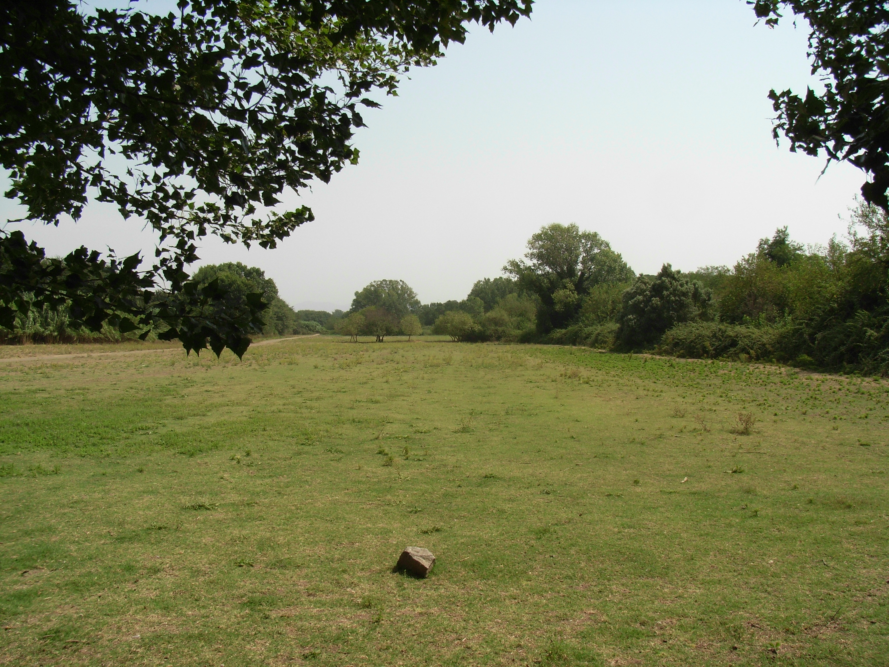 Parco della Caffarella Ranger